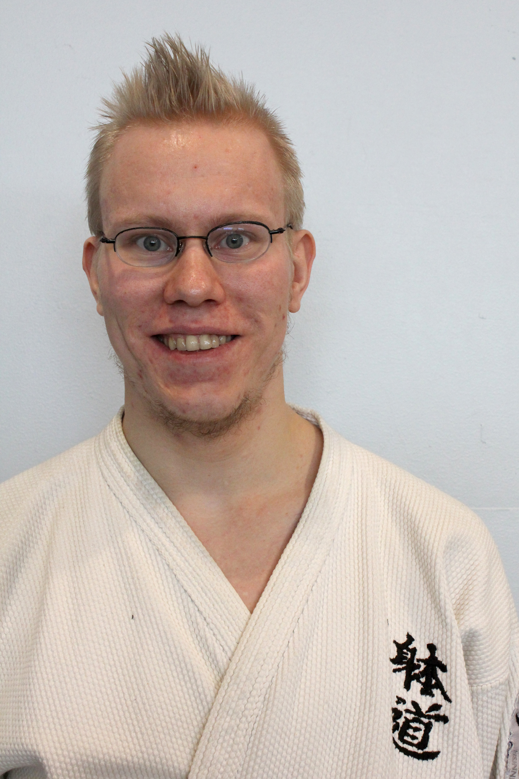 Jukka Solehmainen